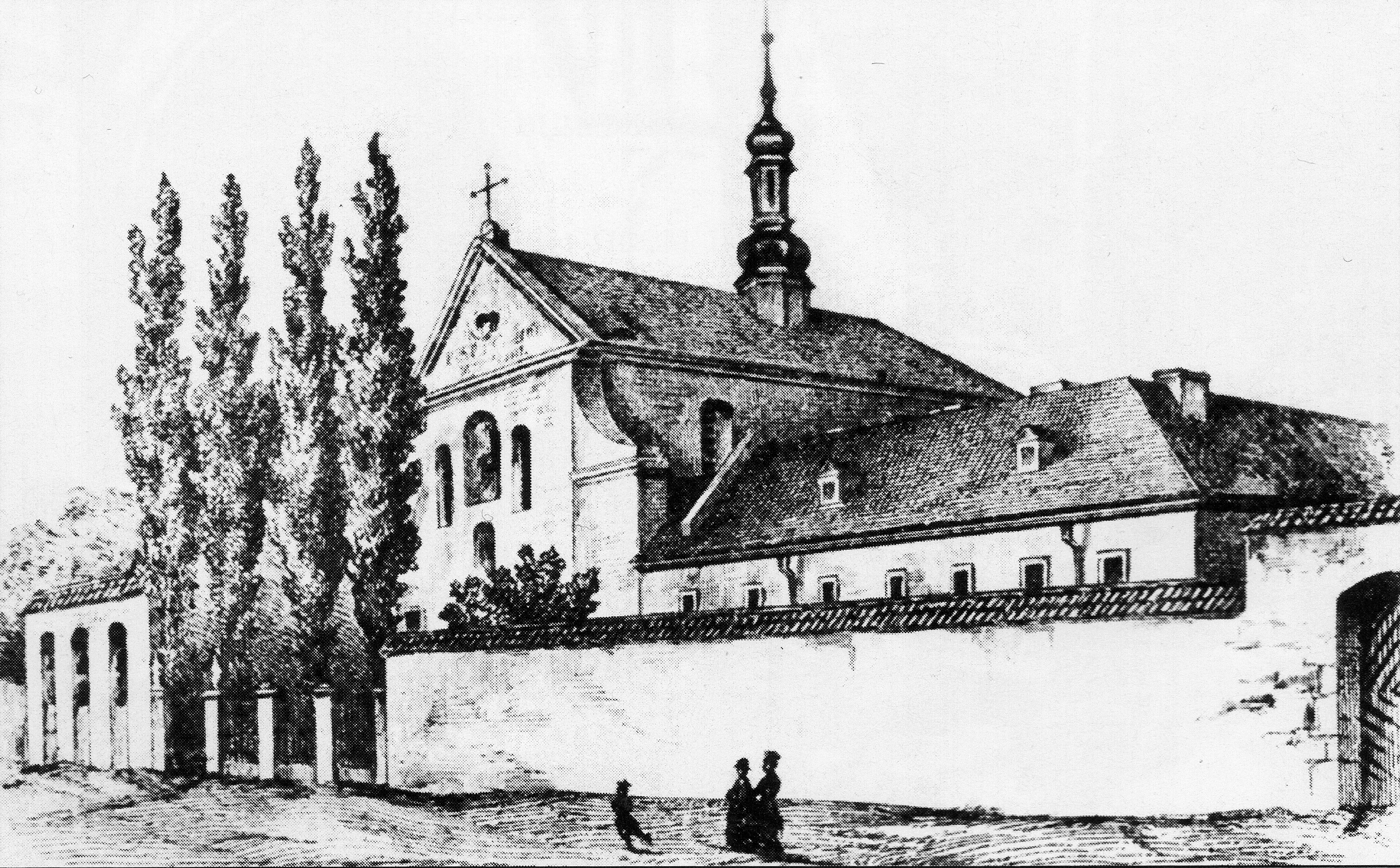 Костел Непорочного Зачаття Діви Марії і монастир францисканців у Львові. 1860-ті роки. Художник Йосиф Свобода.